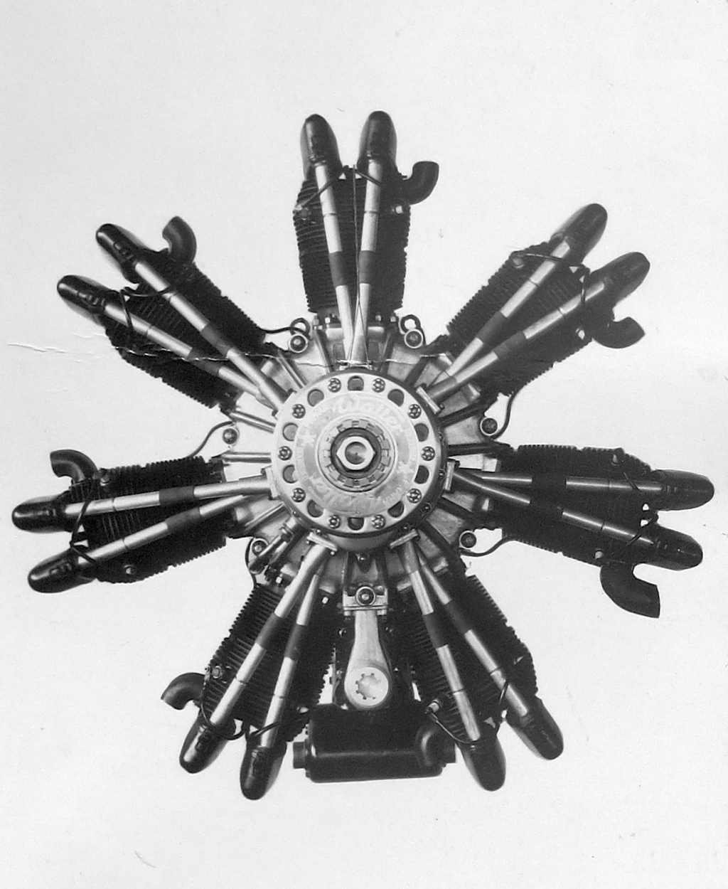 letecký motor Walter Castor II (1932)